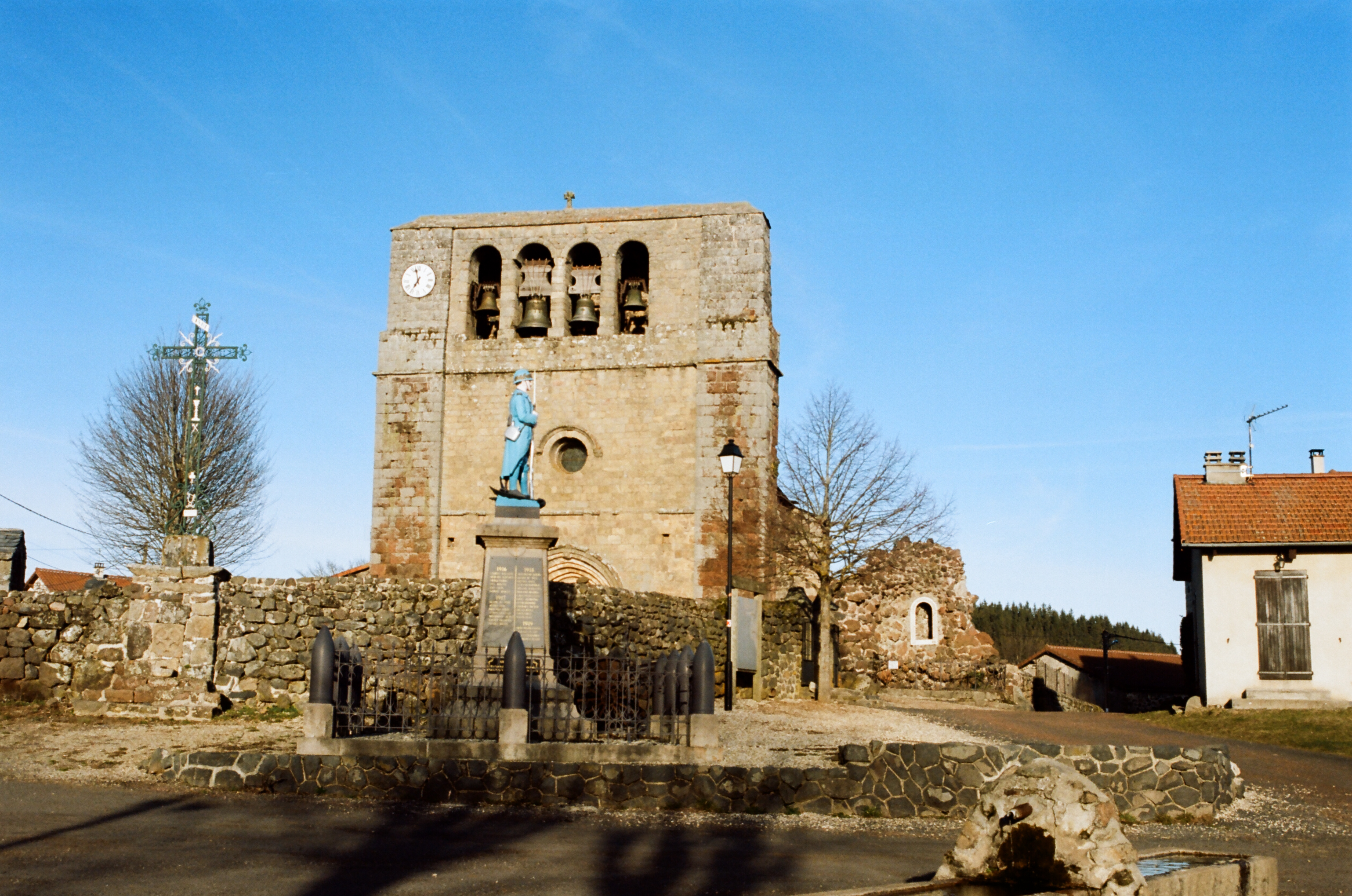 Église romane de Saint Paul de Tartas